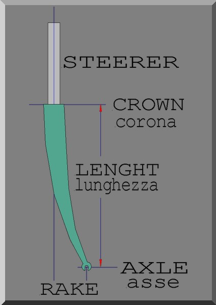 vista di profilo di una forcella, con descrizione di parti e misure